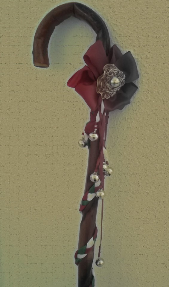 Palo portado por la rabadana